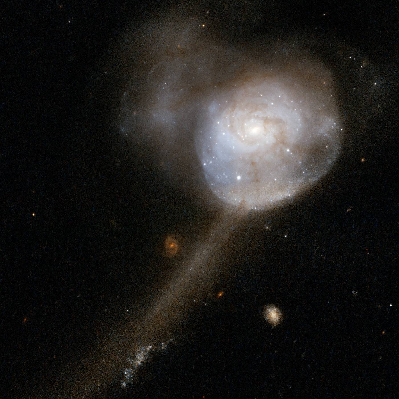 NGC 34